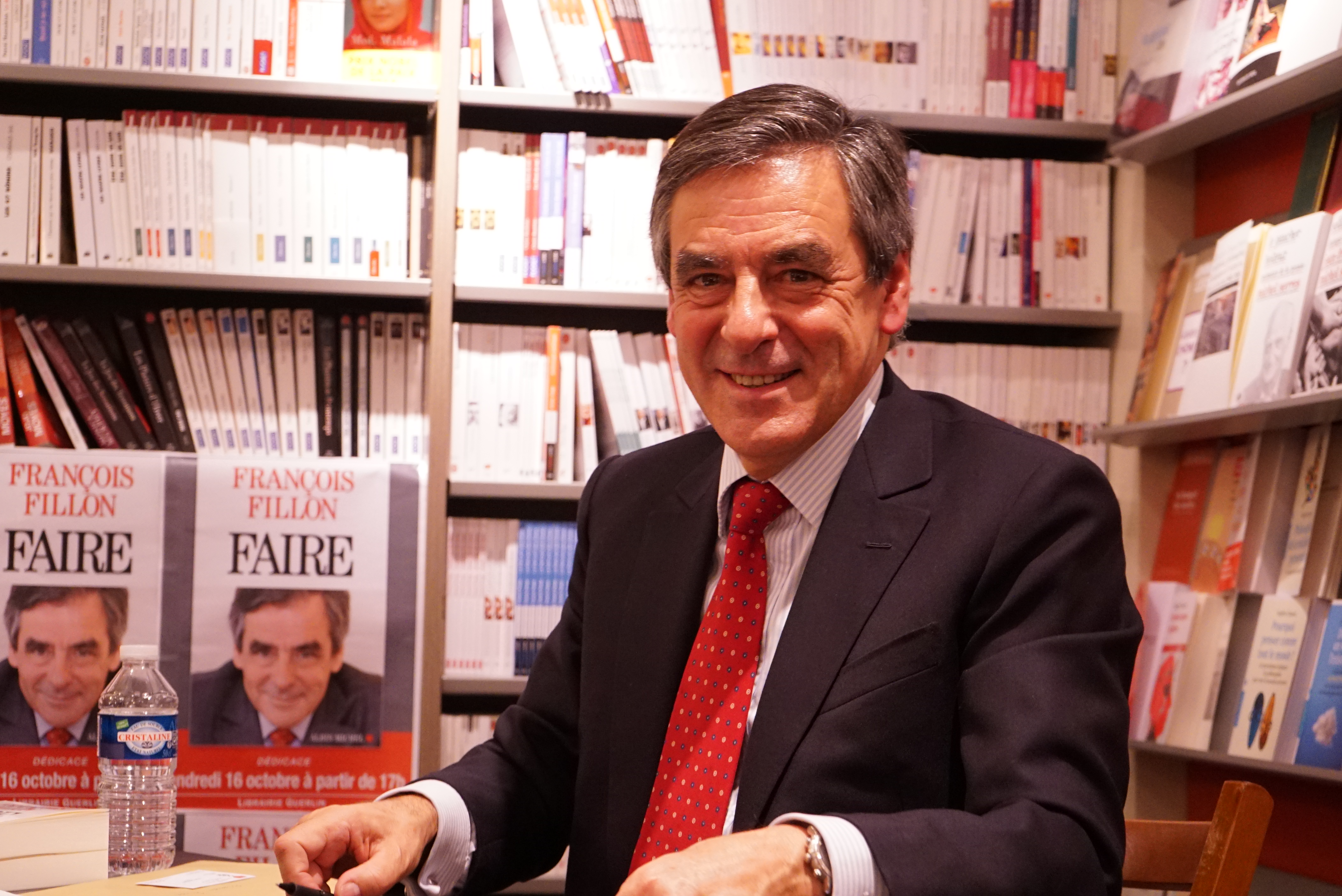 françois fillon dédicaçant son livre en 2015.